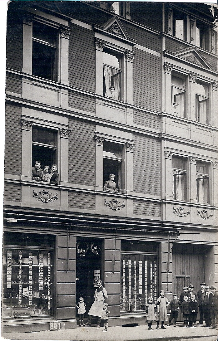 Księgarnia "Wiarus Polski" w Bochum, ok. 1912 r., autor nieznany